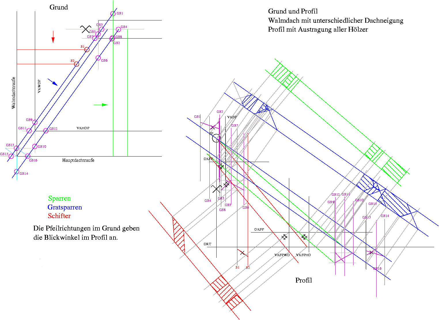 Der Grund und das Profil eines Walmdaches mit verschiedenen Dachneigungen, alle Hölzer ausgetragen